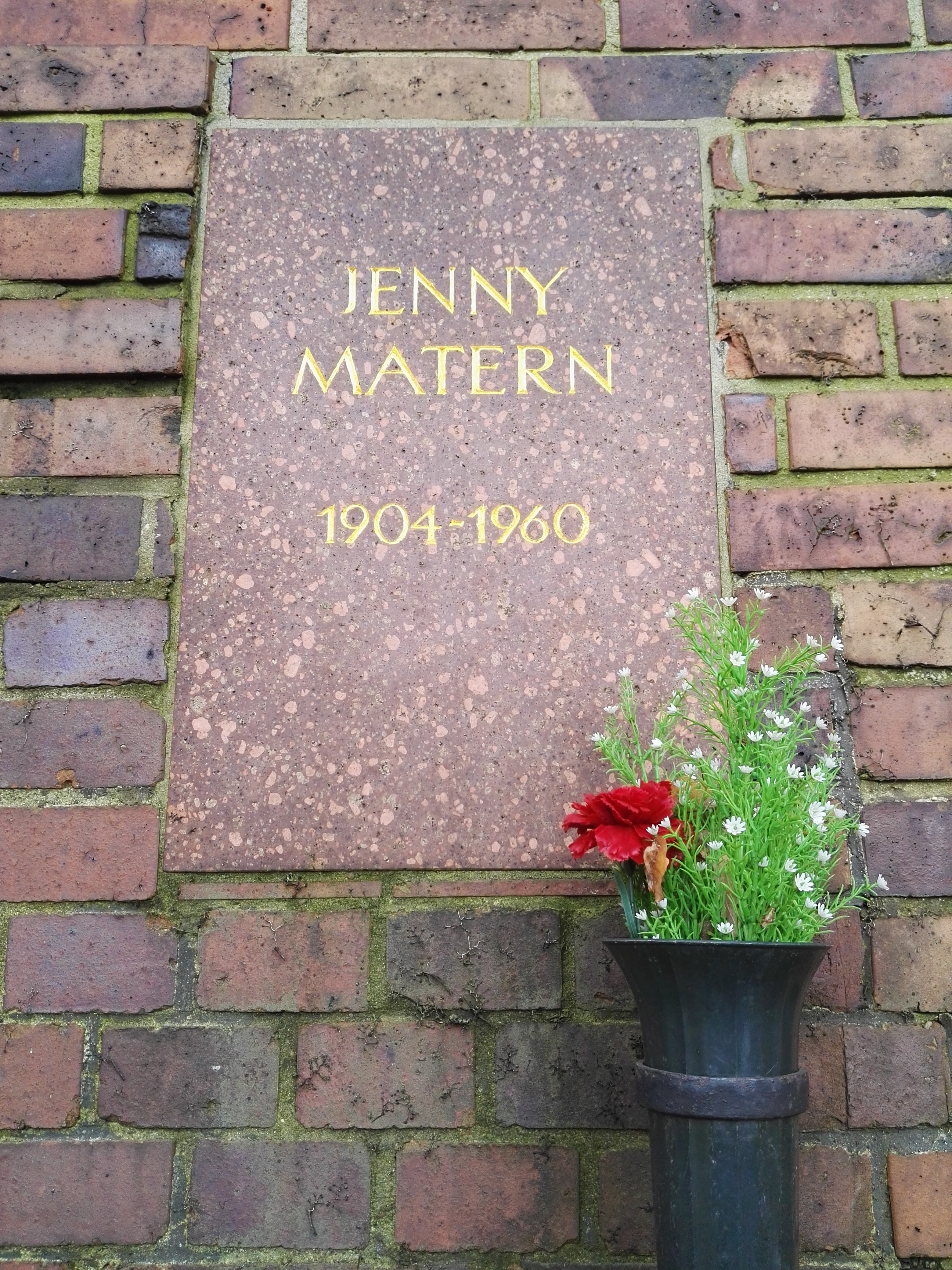 Grab von Jenny Matern in der Gedenkstätte der Sozialisten auf dem Zentralfriedhof Friedrichsfelde in Berlin-Lichtenberg